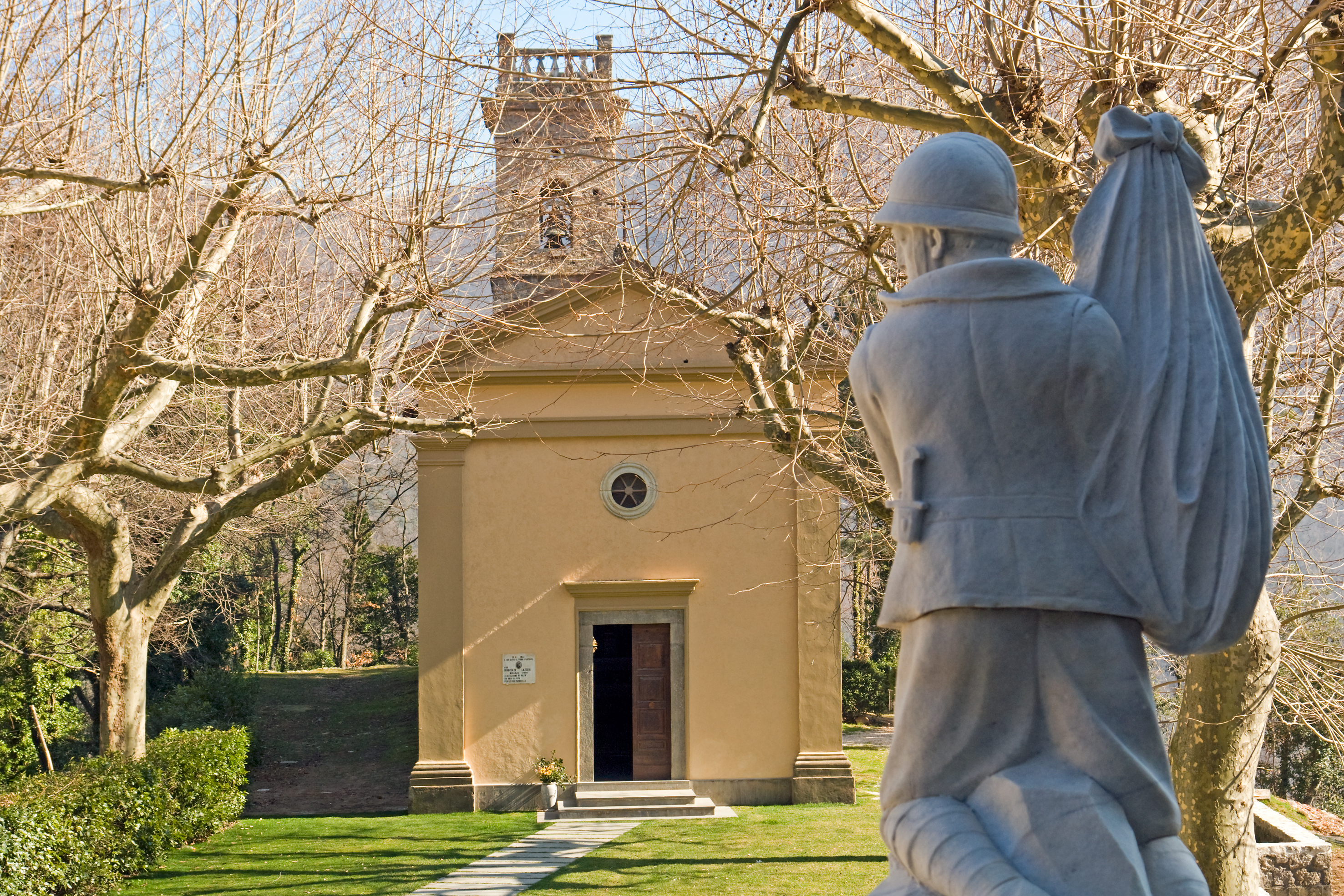 Sant' Anna di Stazzema, Kirche und Kriegerdenkmal 1915-1918